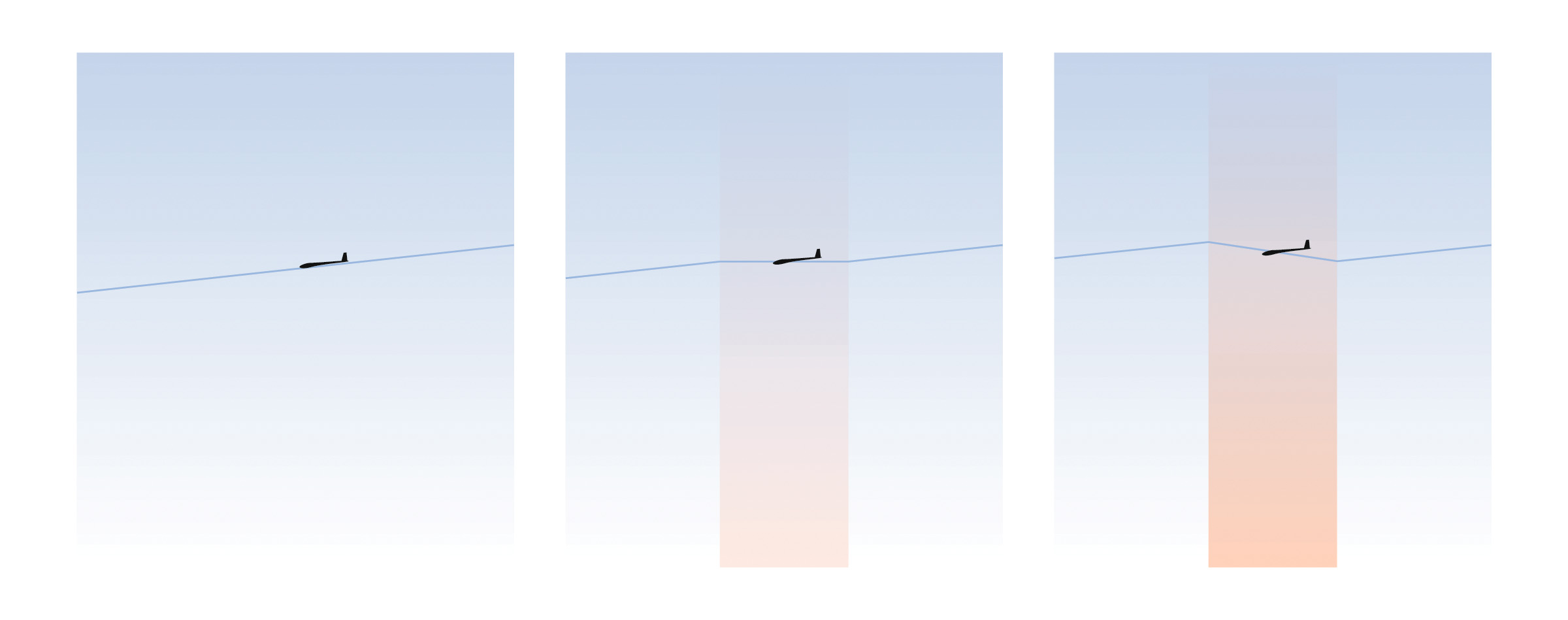 Gleitflug. Links bei ruhiger Luft, mitte bei leichtem Aufwind (Nullschieber), rechts bei stärkerem Aufwind oder stärkerer Termik. Eigene Zeichnung.